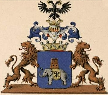 Le Forti suguvõsa parunivapp